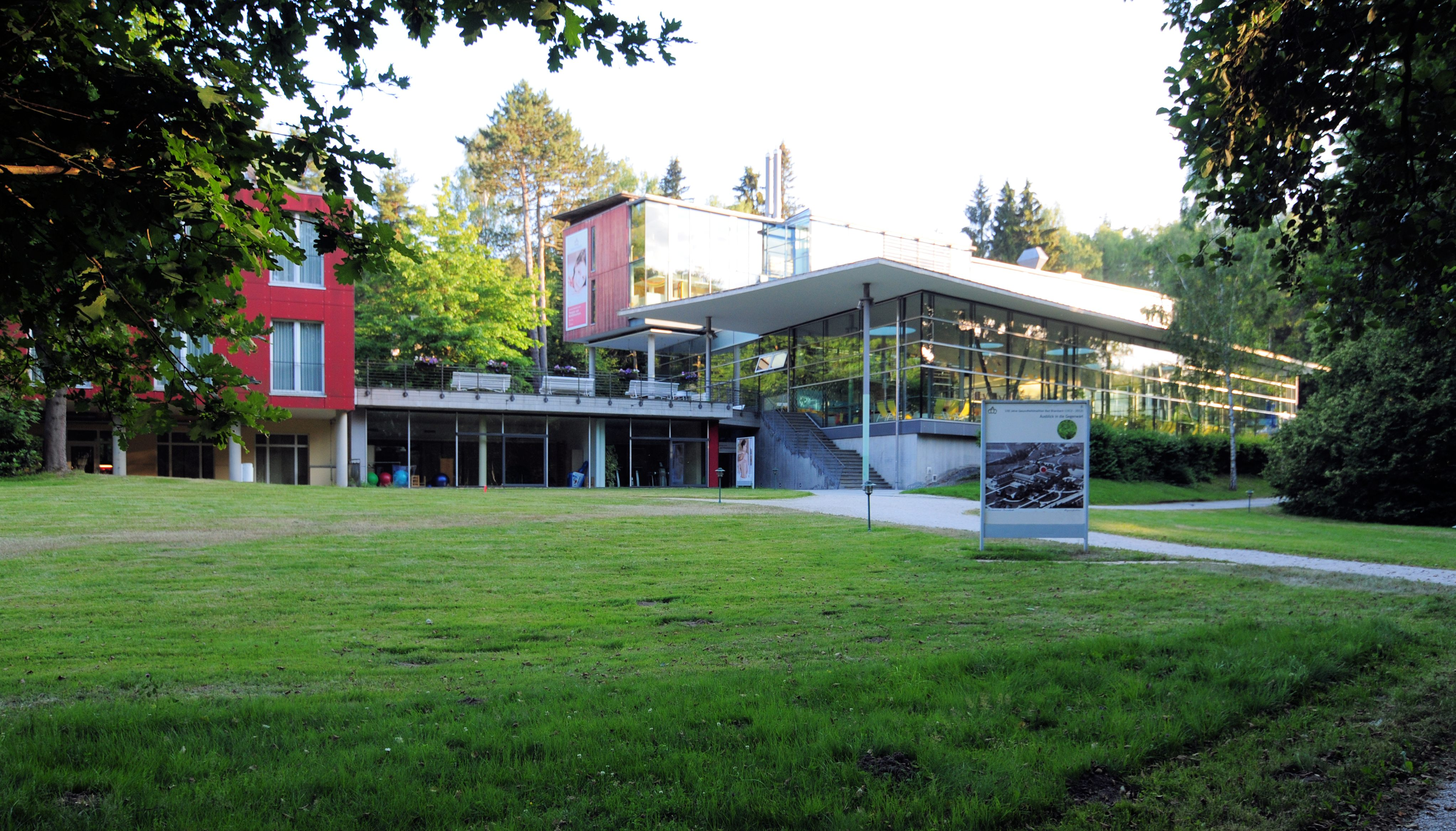 Gemeinde Bad Brambach, Kurpark Bad Brambach, Kuranlagen (Vogtlandkreis, Freistaat Sachsen, Deutschland)